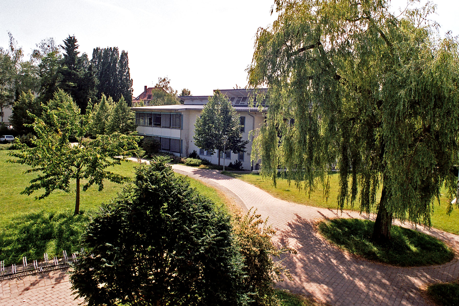 Ein Teil des Informatikzentrums der Hochschule Ravensburg-Weingarten am späten Nachmittag.